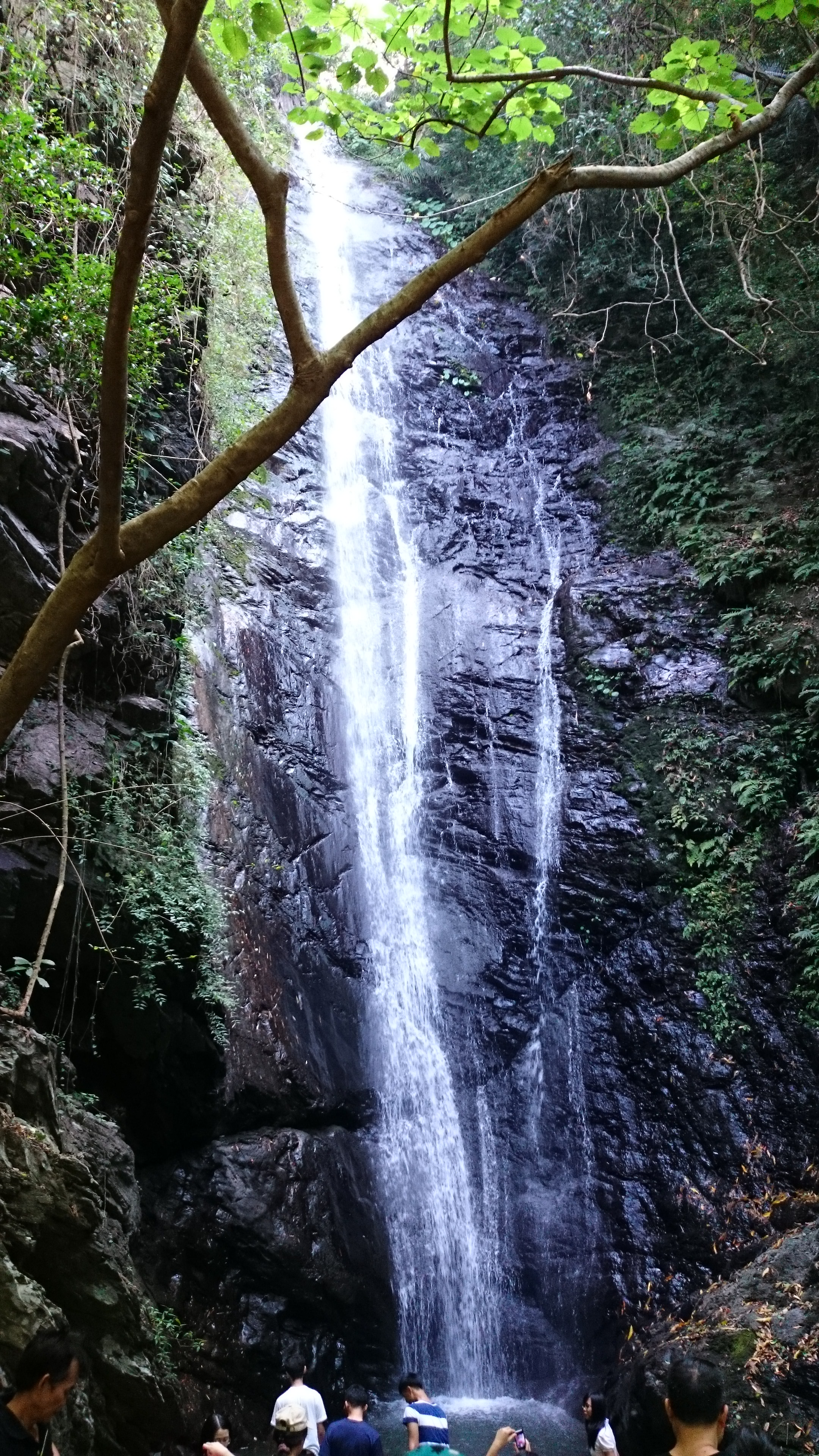 這是一個位於台灣，屏東三地門的美麗瀑布-大津瀑布!